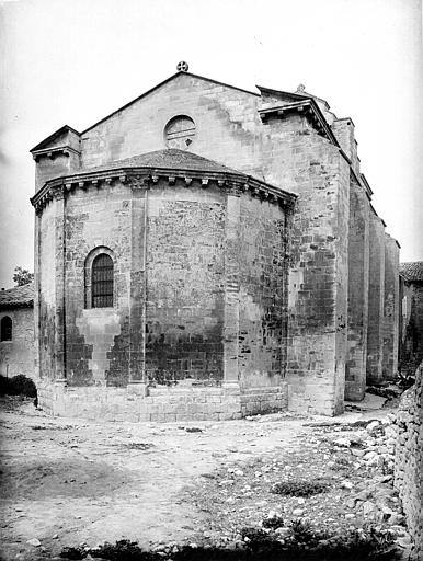 Église de Saint-Restitut par Mieusement.